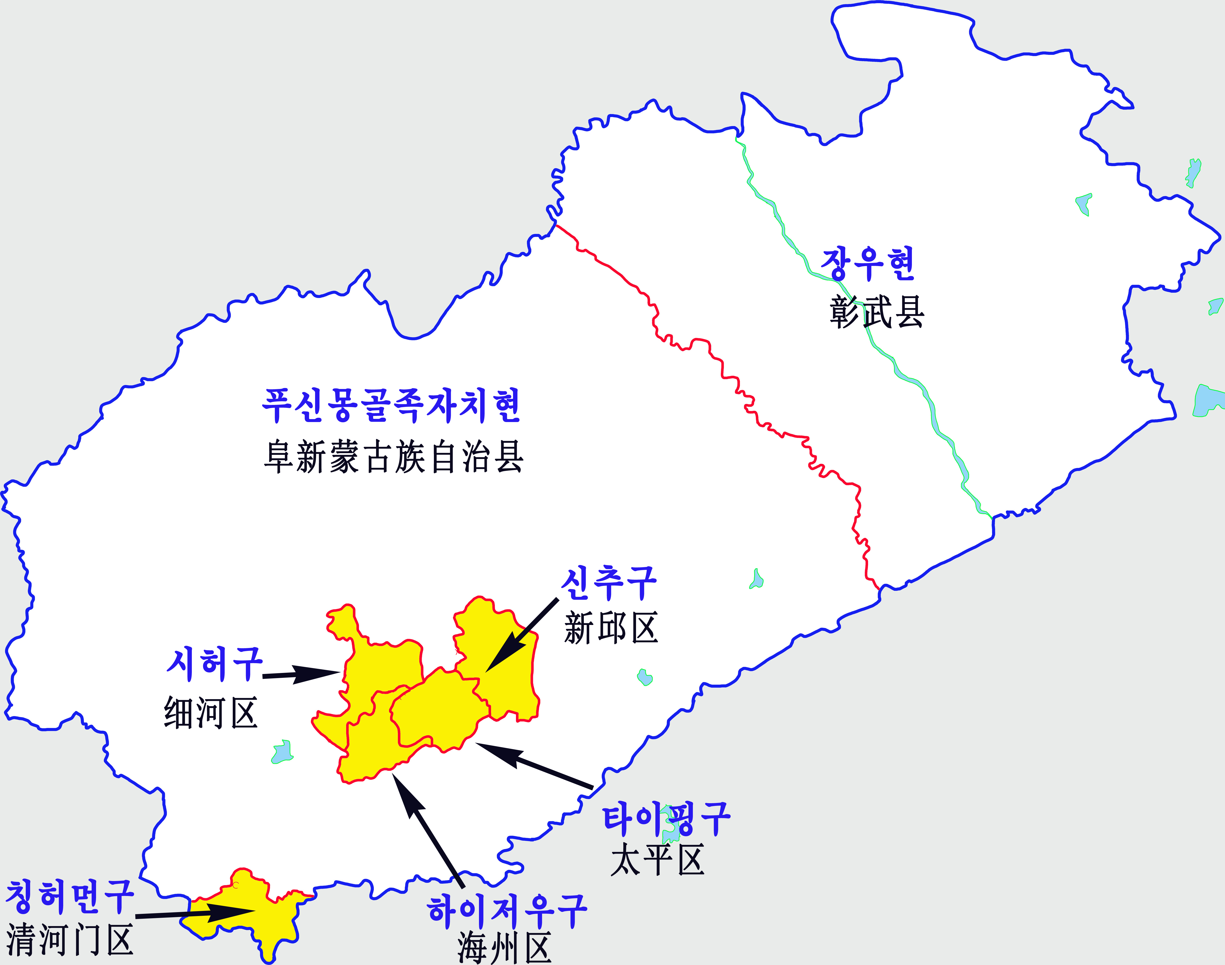 푸신시 지도